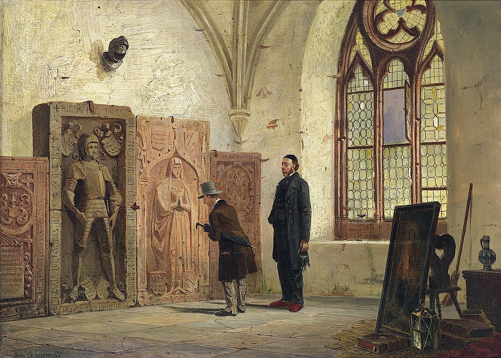 Oldsaksgranskeren.